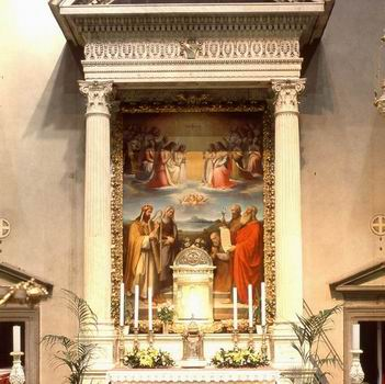 Carceri, altare centrale